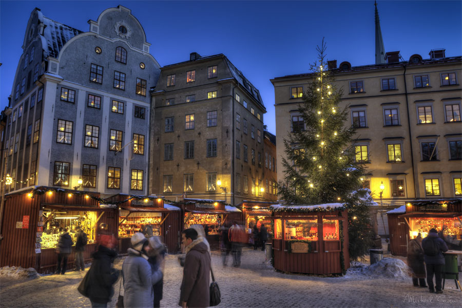 Christmas Market in Old Town in Stockholm, Sweden. "Julmarknad i Gamla Stan"